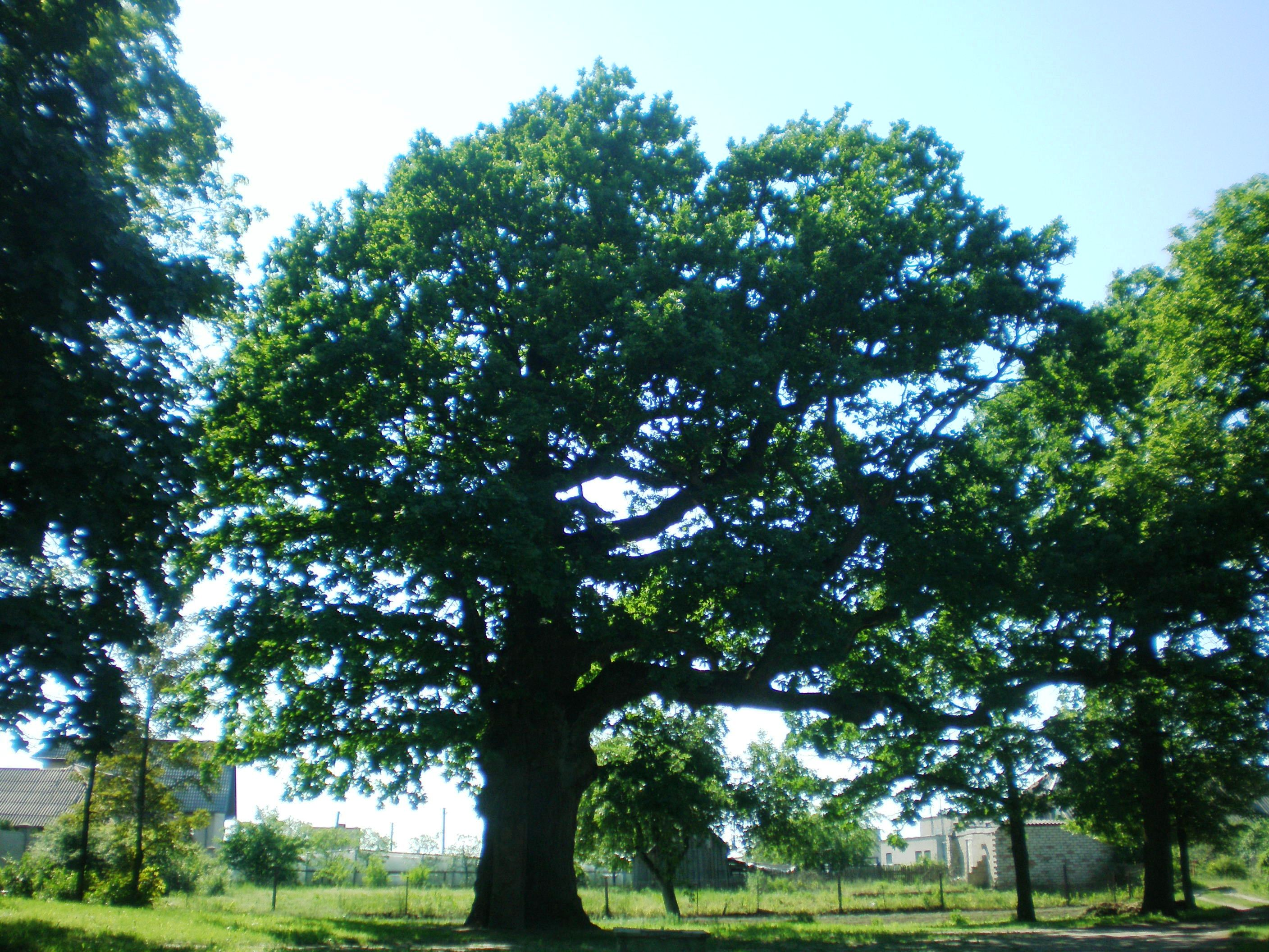 Mikalojaus Daukšos ąžuolas.